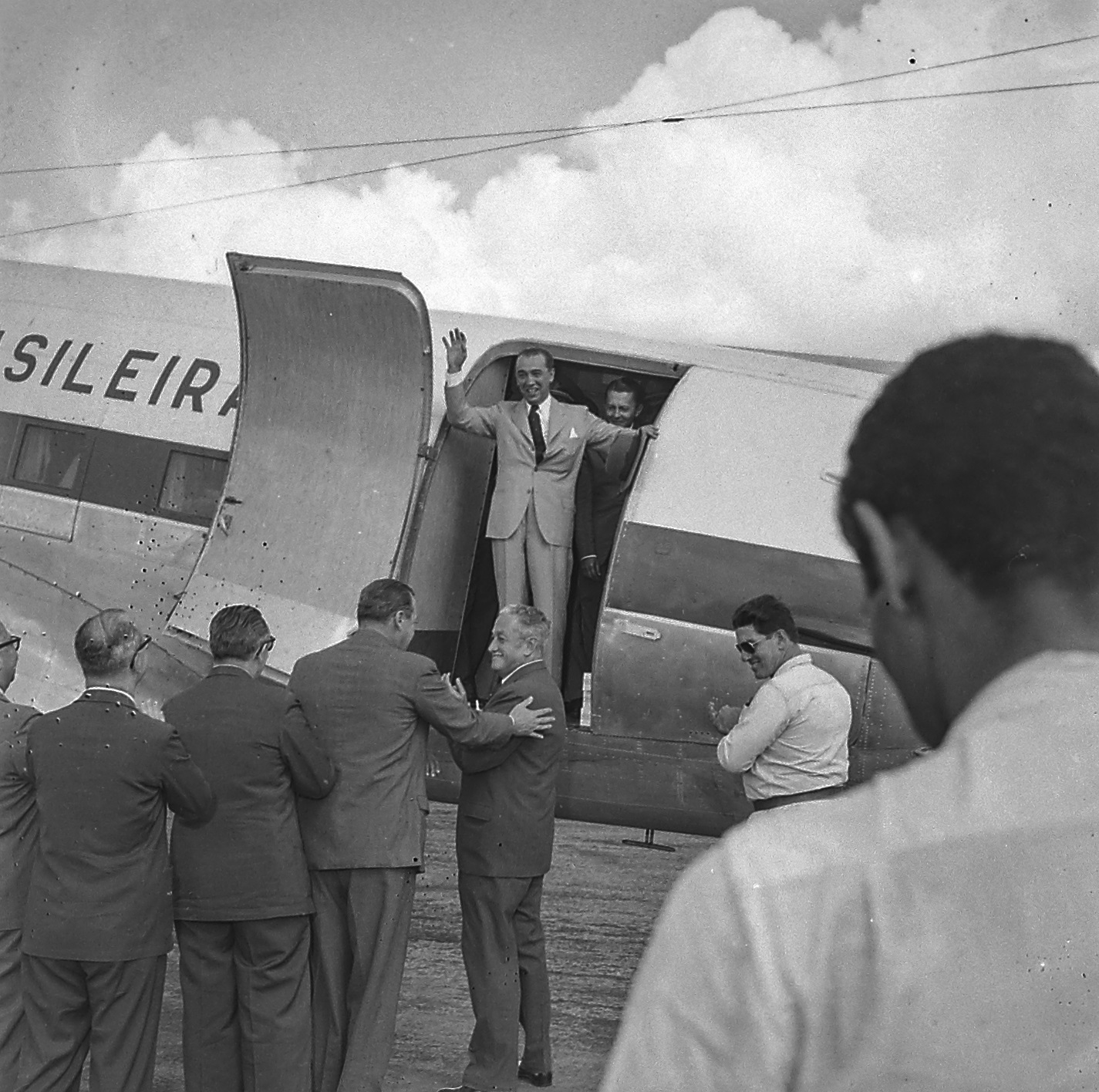 Imagem do Fundo Agência Nacional, do Arquivo Nacional